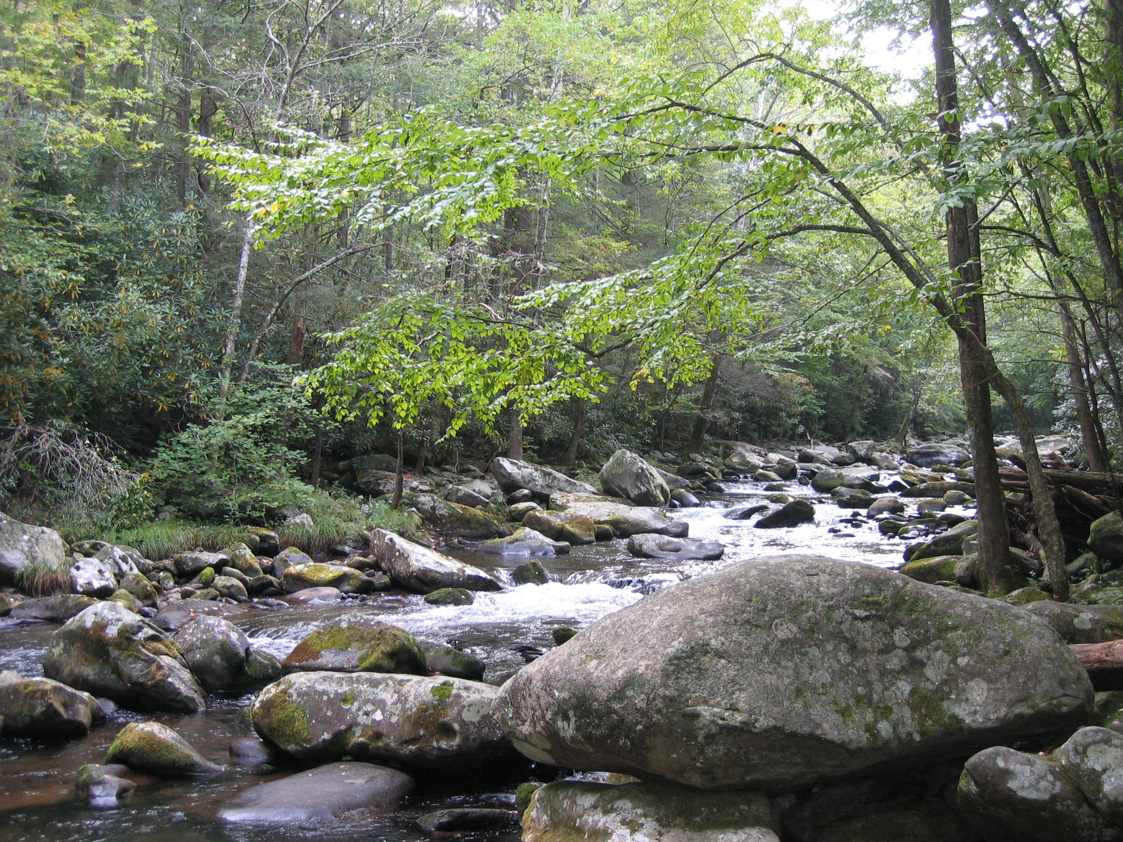 Wilder Fluss in Great-Smoky-Mountains-Nationalpark, USA